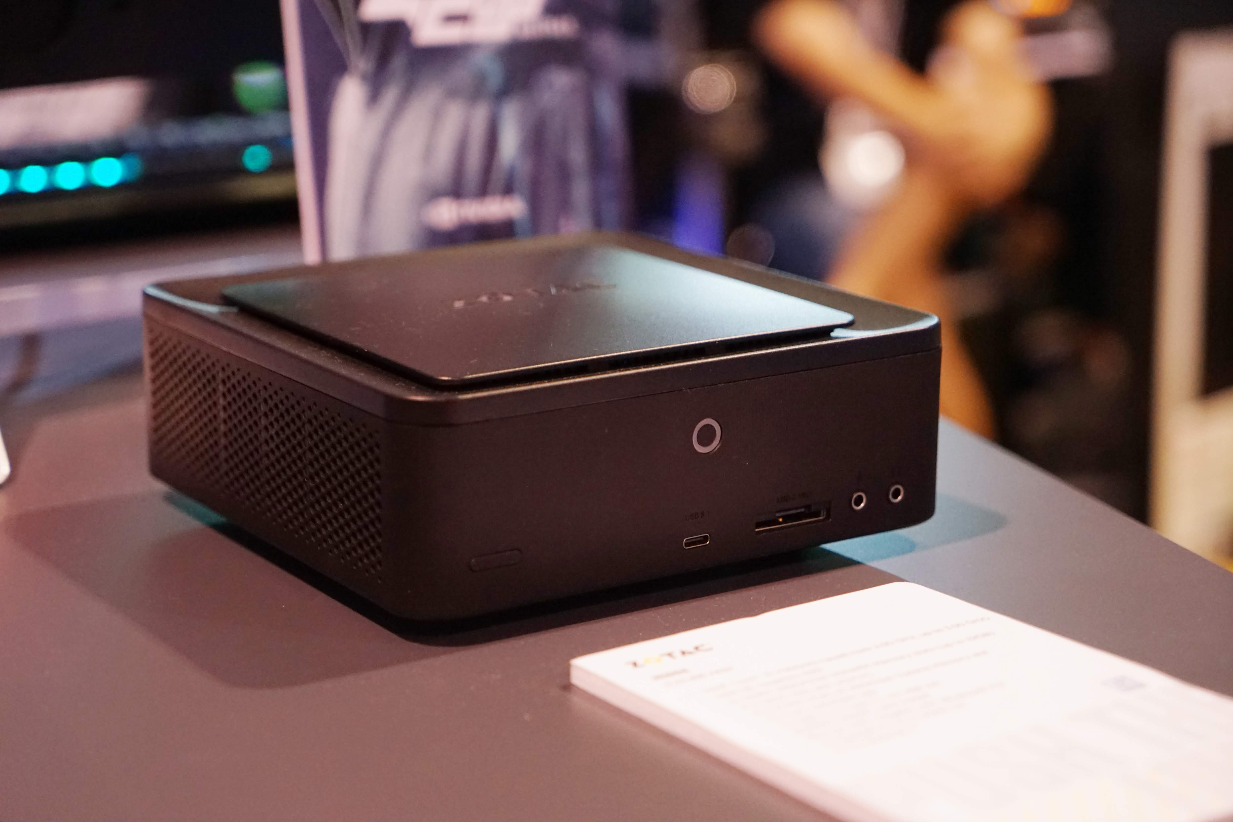 zotaczbox